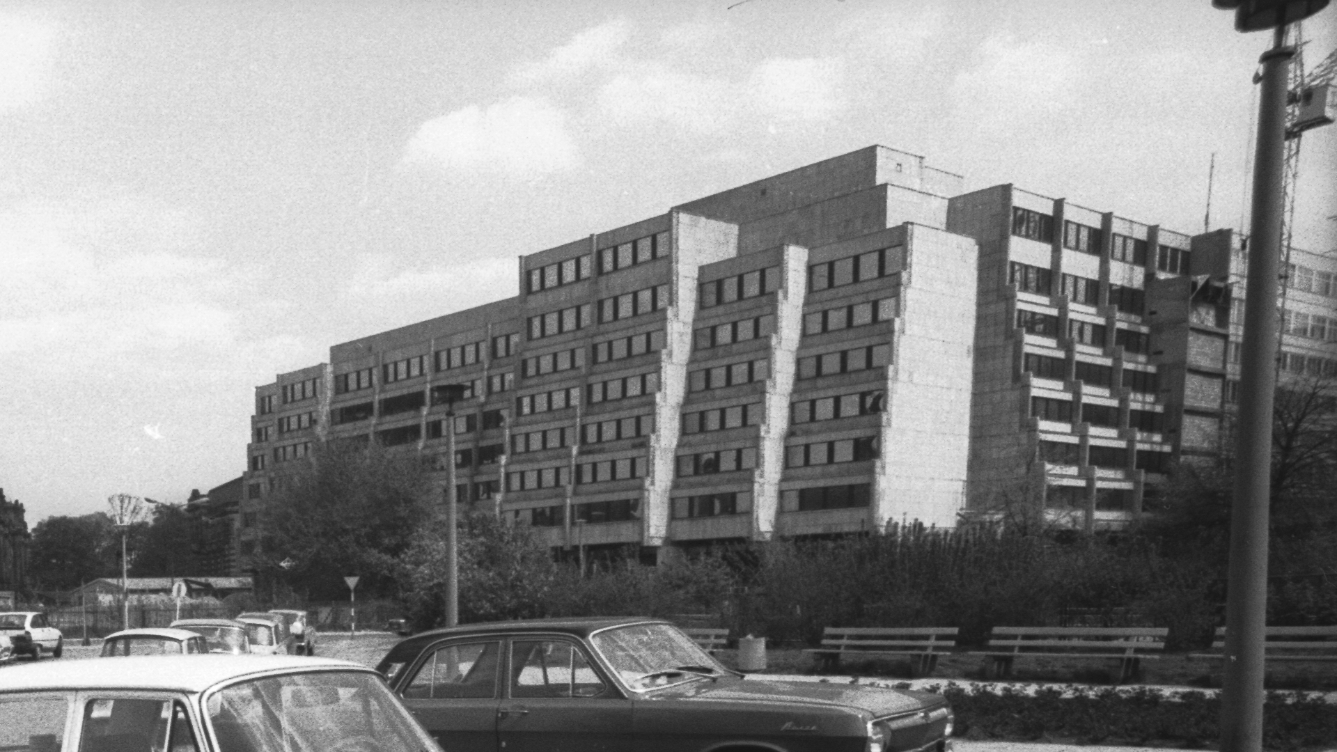 Moderner Anbau auf der Rückseite des Polizeipräsidiums Dresden (Volkspolizei-Kreisamt), vom südlichen Teil des Neumarkts gesehen (Moritzgasse)